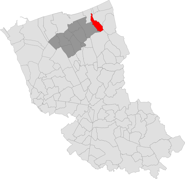 Locatie gemeente Uksem in arrondissement Duinkerke. Zelfgemaakt. Location of Uxem municipality in the arrondissement of Dunkirk. Self made. Localisation de la commune d'Uxem dans l'arrondissement de Dunkerque. Fait moi-même.